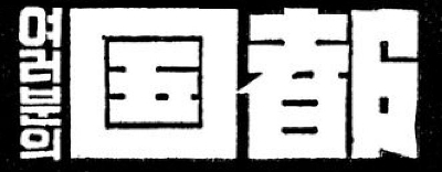 國都劇場のロゴ